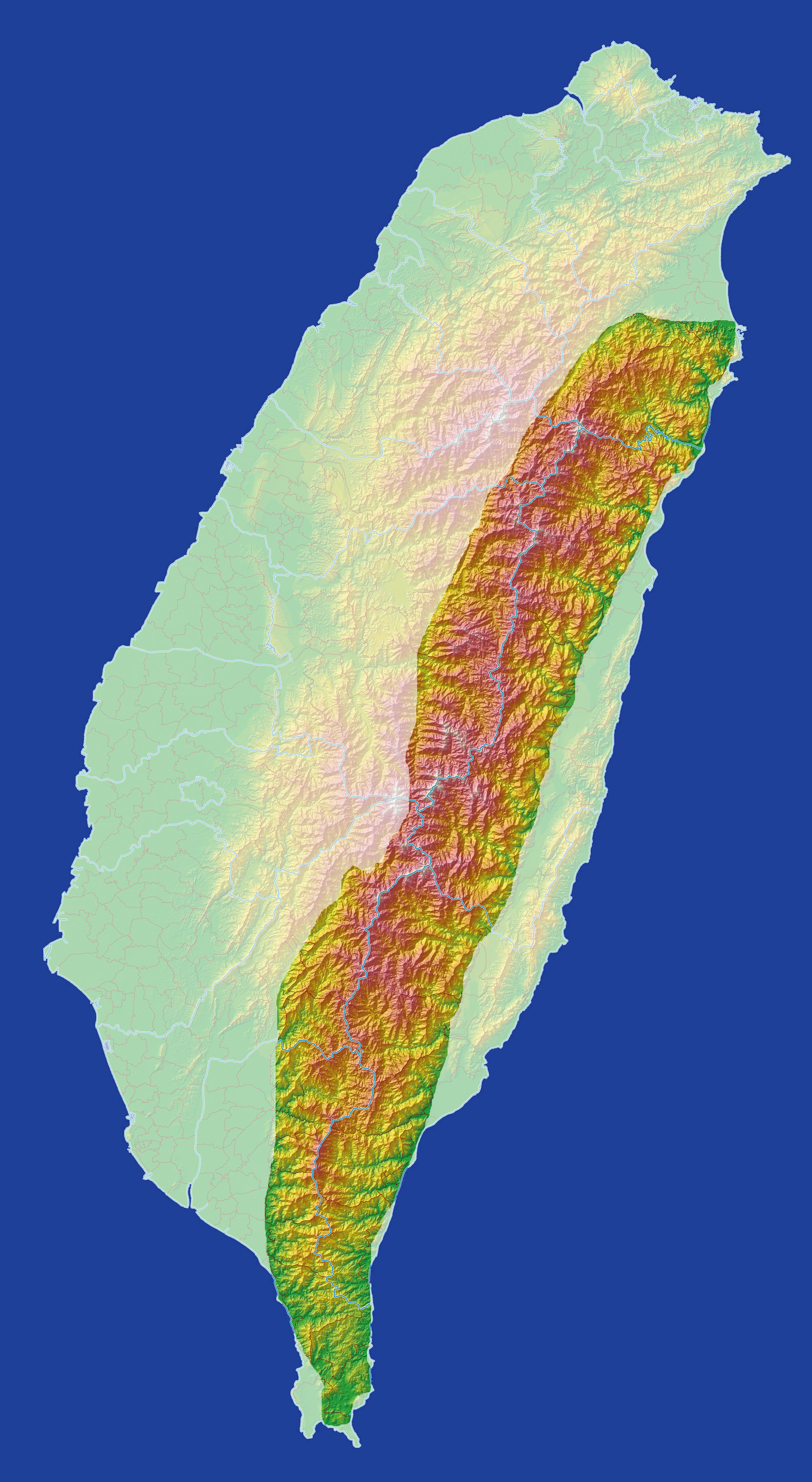 Map of Central MountainRange, Taiwan